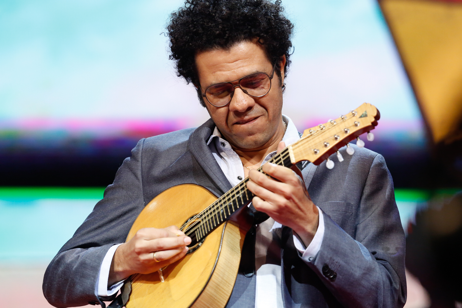 Hamilton de Holanda durante o 25º Premio da Musica Brasileira no Theatro Municipal. Foto: Roberto Filho (14/05/14)